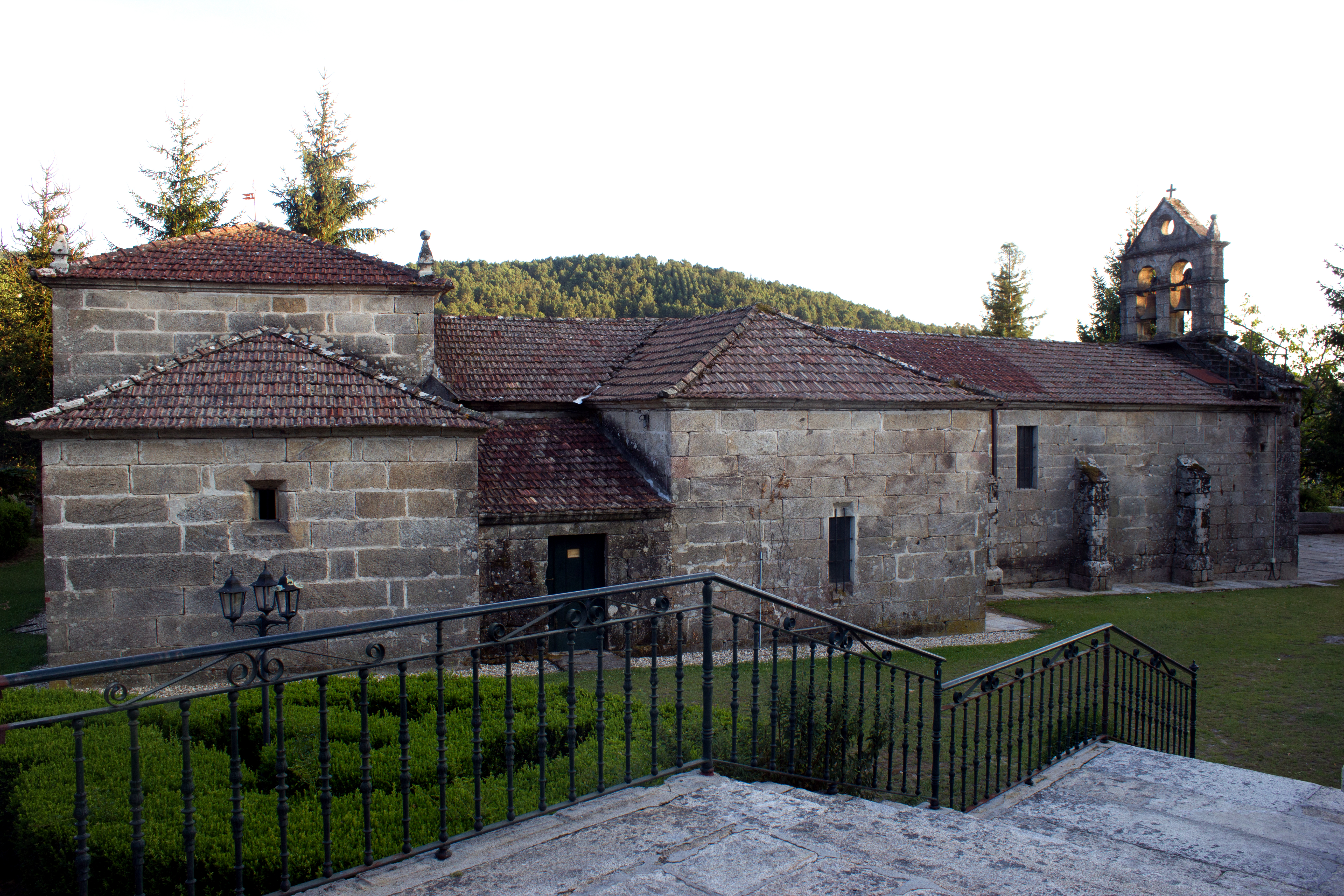 Igrexa de Santiago de Covelo no concello de Covelo.